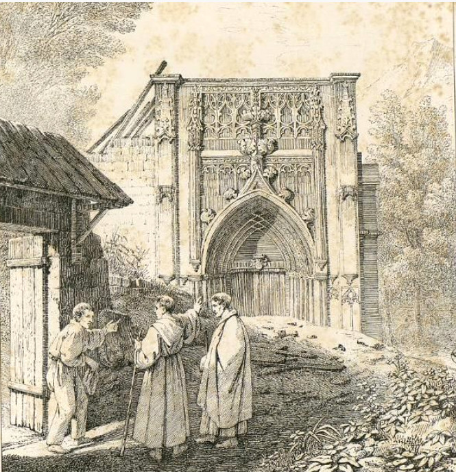 Pierre Lacour, Voyage en Italie 1824-1825, page 71 ː Ruines de l'abbaye d'Hautecombe.